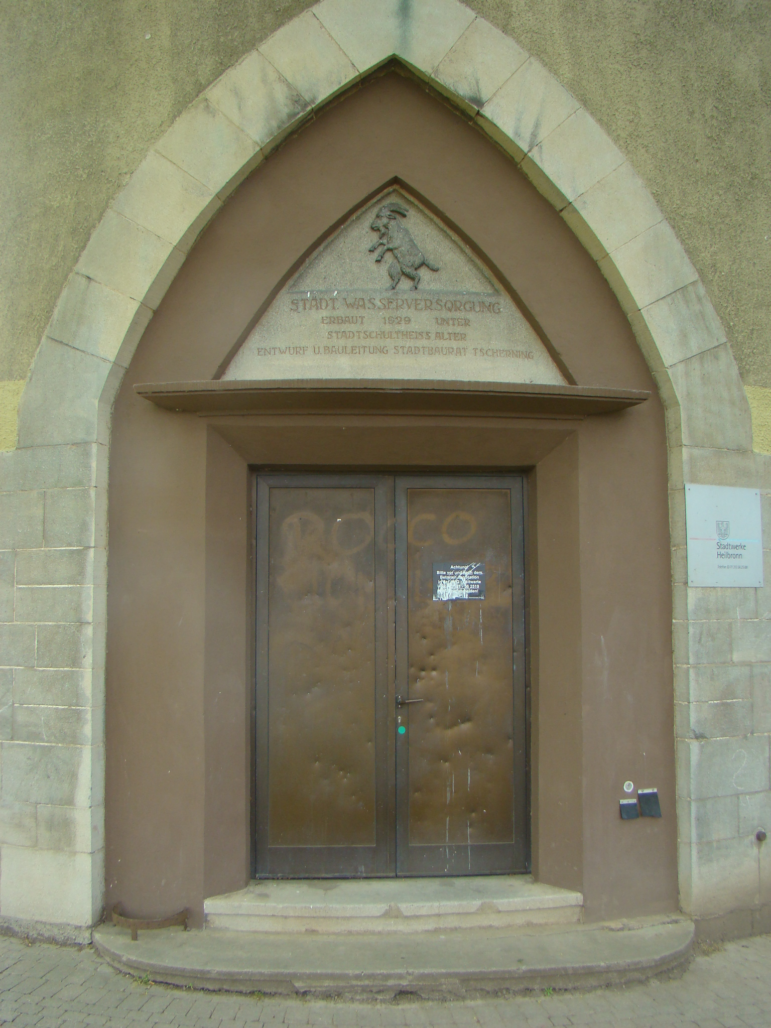 Heilbronn-Böckingen, Wasserturm